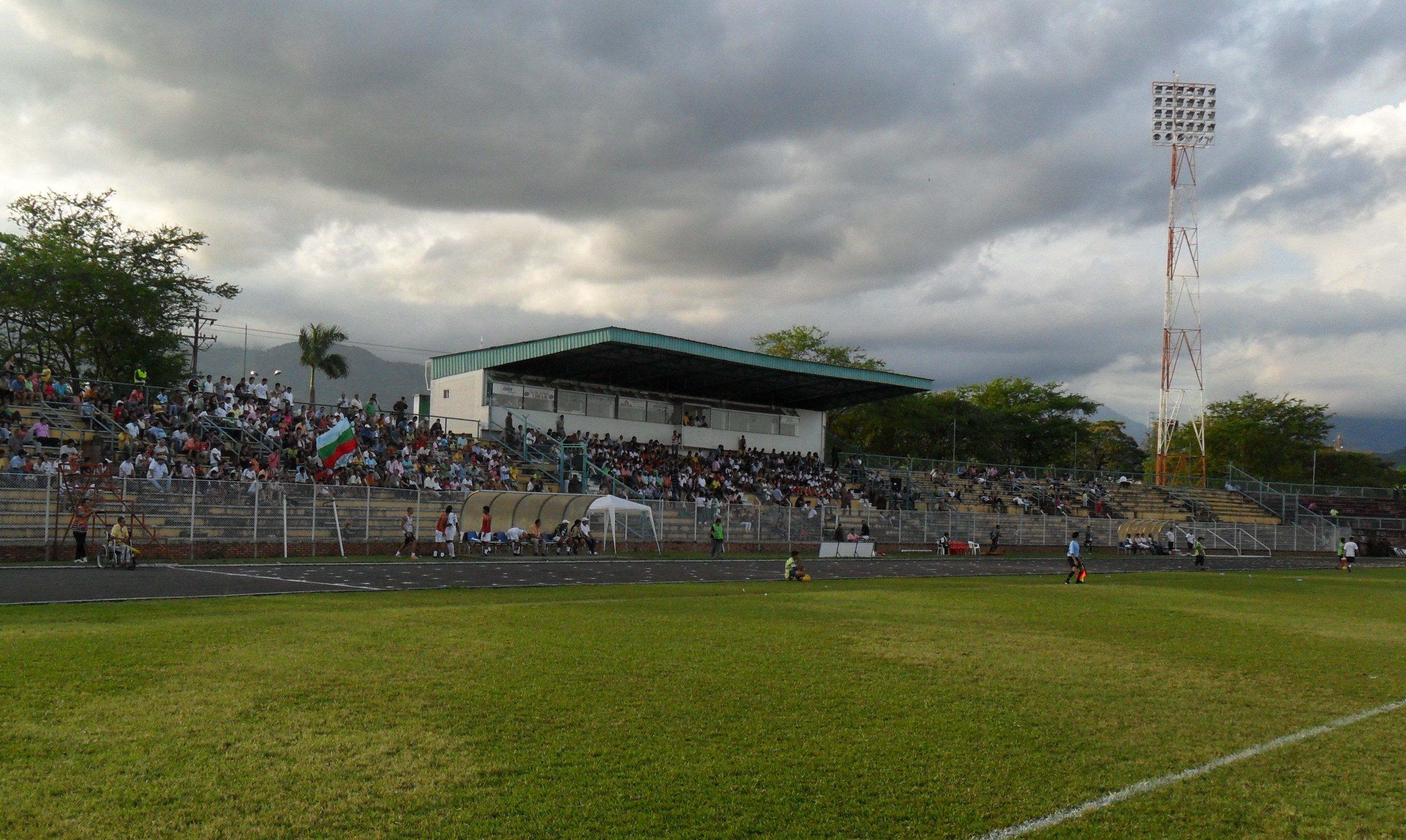 Estadio Manuel Calle Lombana - Villavicencio